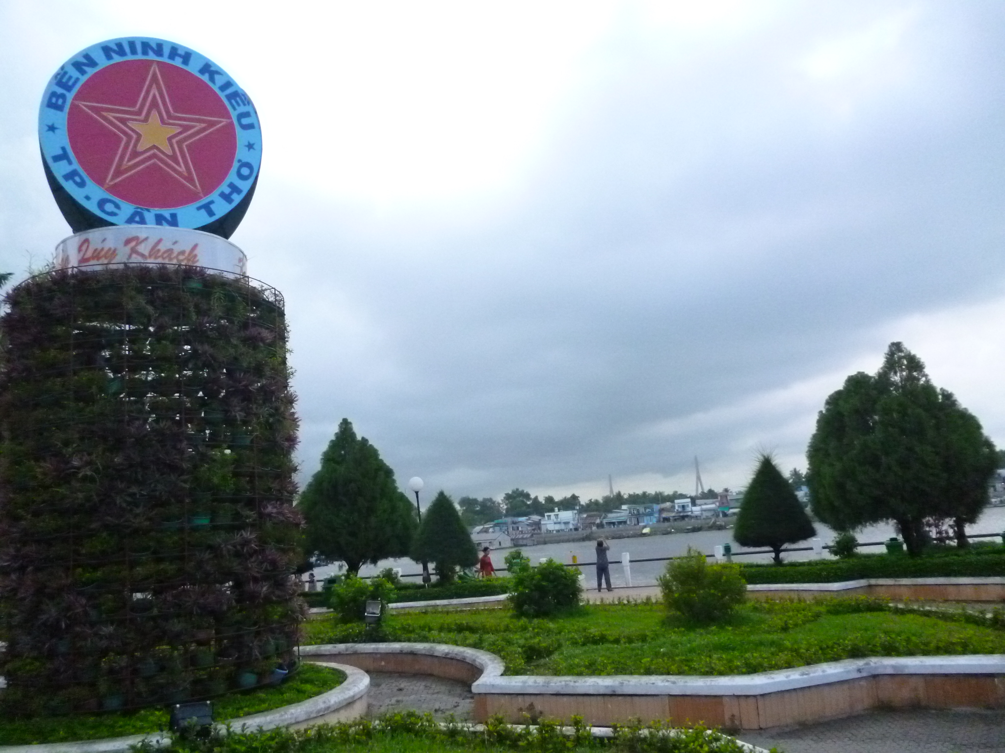 Hình chụp Bến Ninh Kiều, Cần Thơ bằng máy ảnh cá nhân